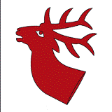 Flago de Andwil, Kantono Sankt-Galo, Svislando